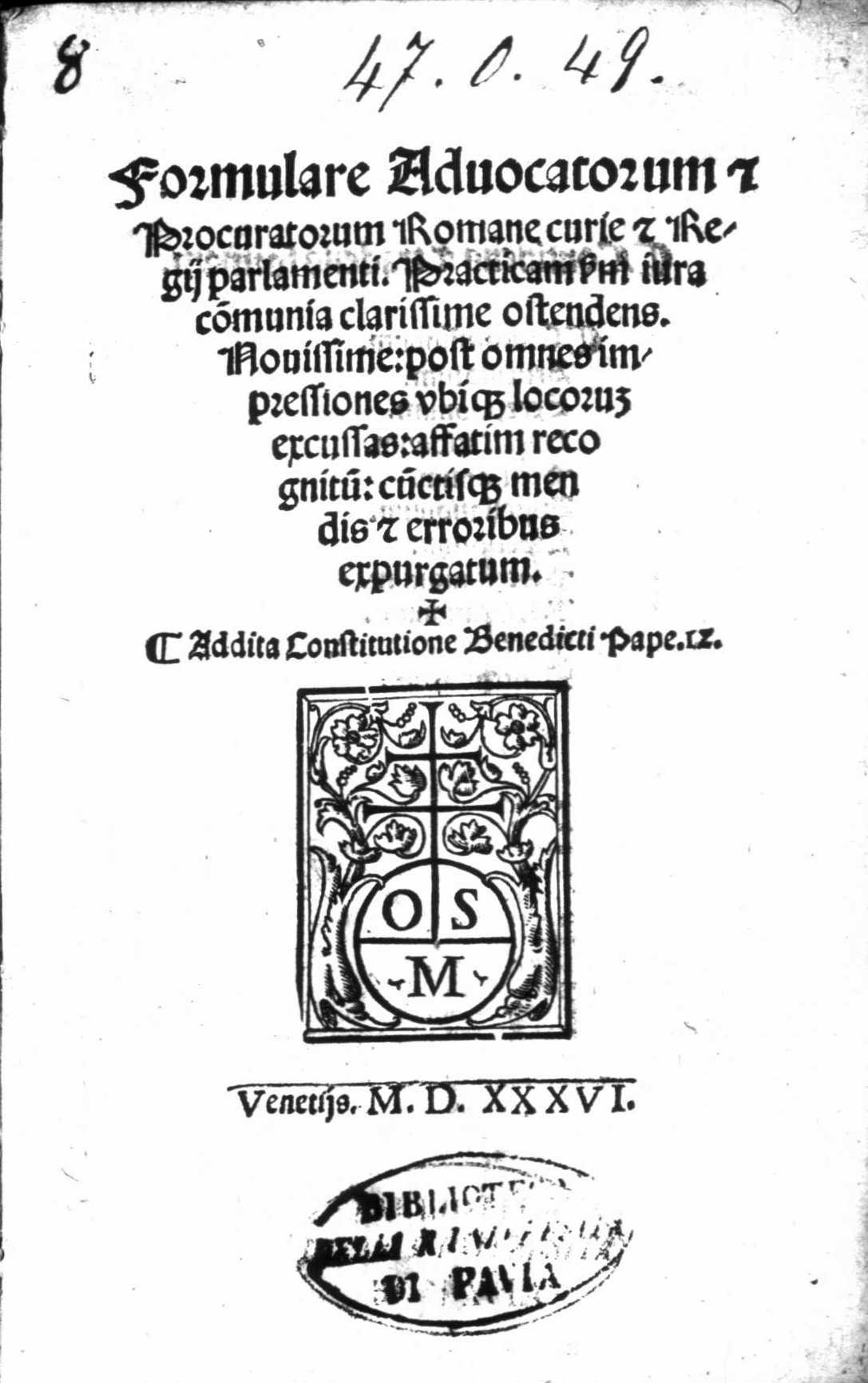 Frontespizio